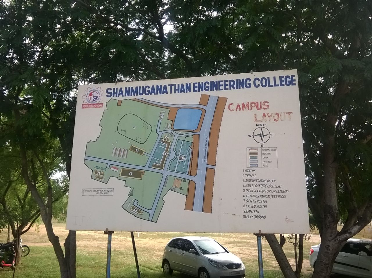 அமைவு